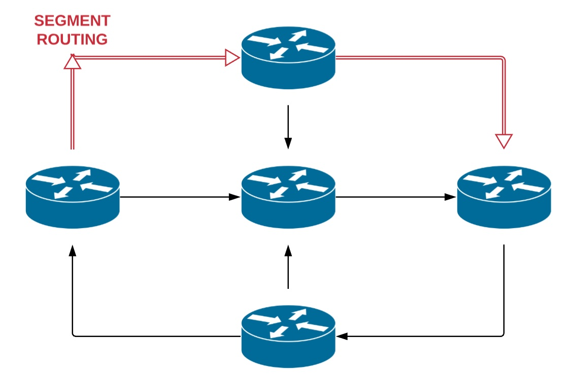 SEGMENTO DE ENRRUTAMIENTO